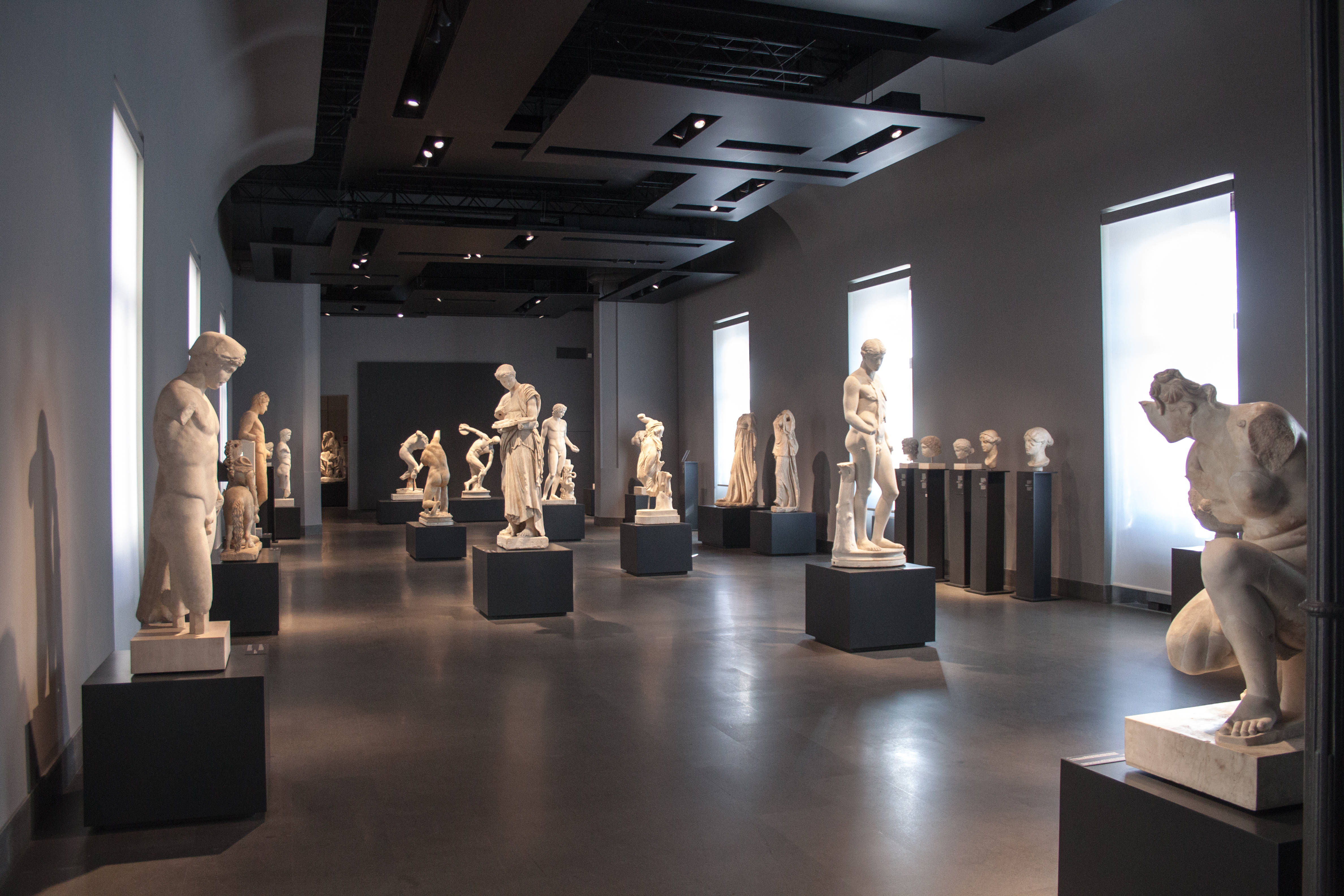 Palazzo Massimo interior